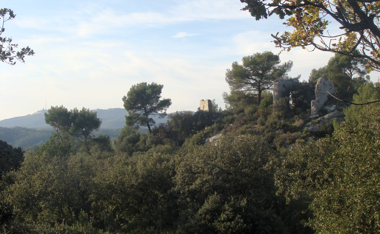 Sur la droite, les ruines du Château de Ners ; au fond à gauche, la chaîne de l'Etoile.